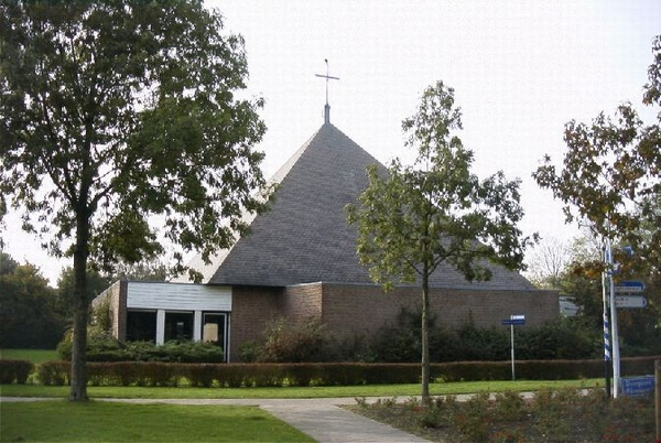 Het in 1982 gebouwde (multifunctioneel) kerkgebouw De Paadwizer, Balk